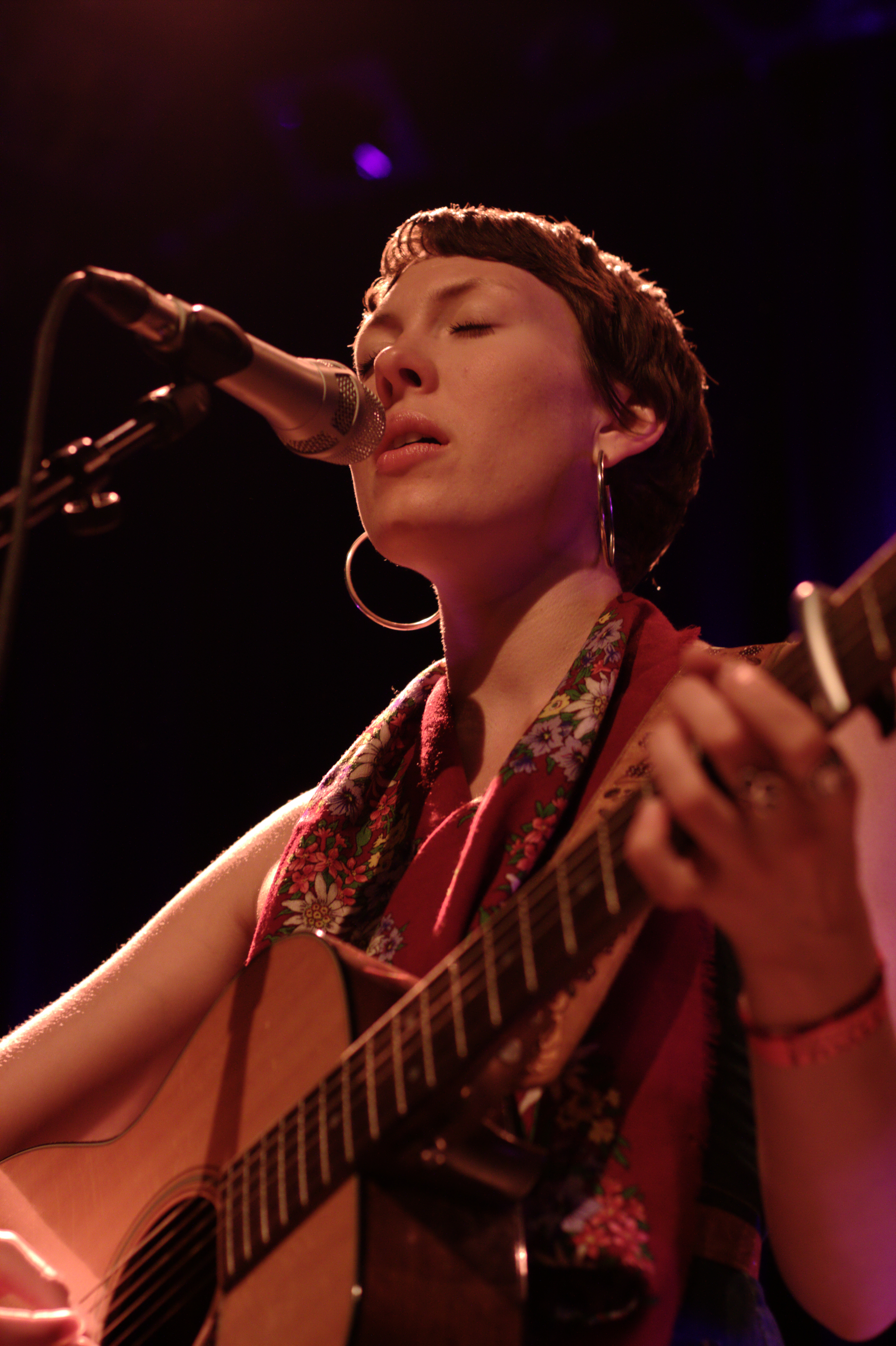 Alela Diane